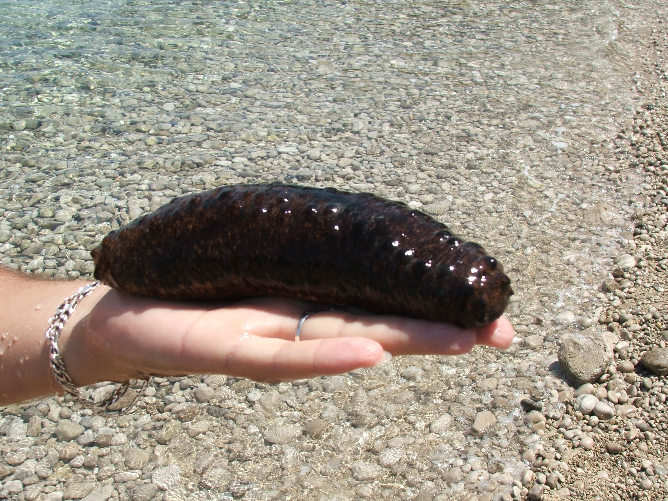 Tengeri uborka (Holothuria tubulosa)- Holothuroidea